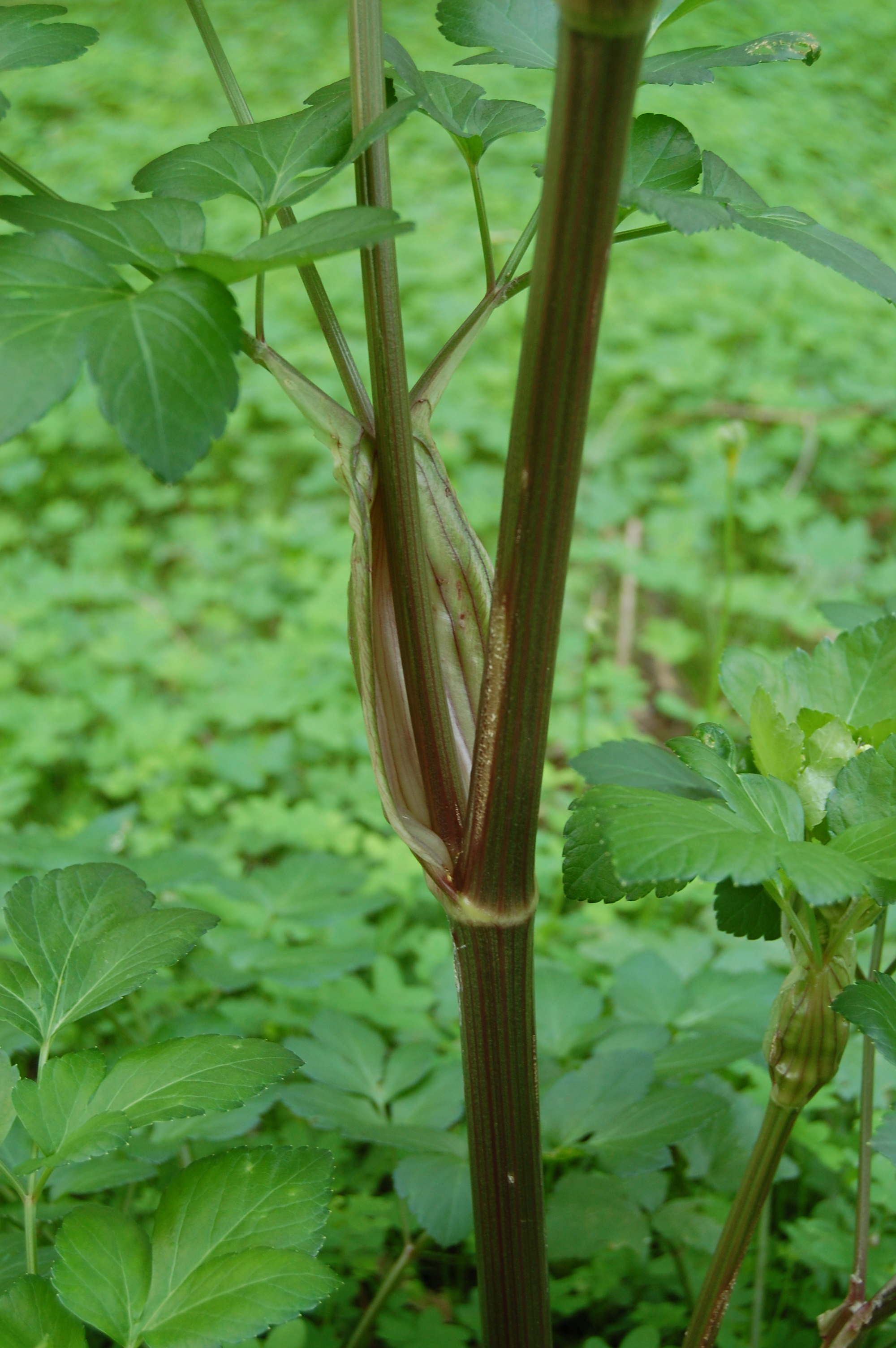 Smyrnium olusatrum Riserva naturale Monte Pellegrino